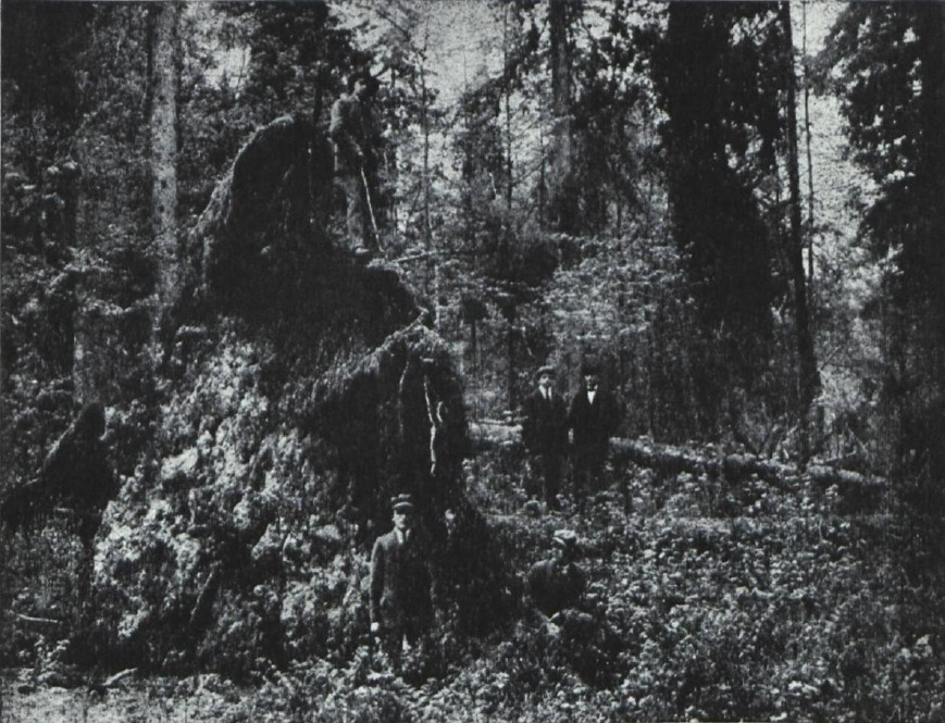 Põlismets